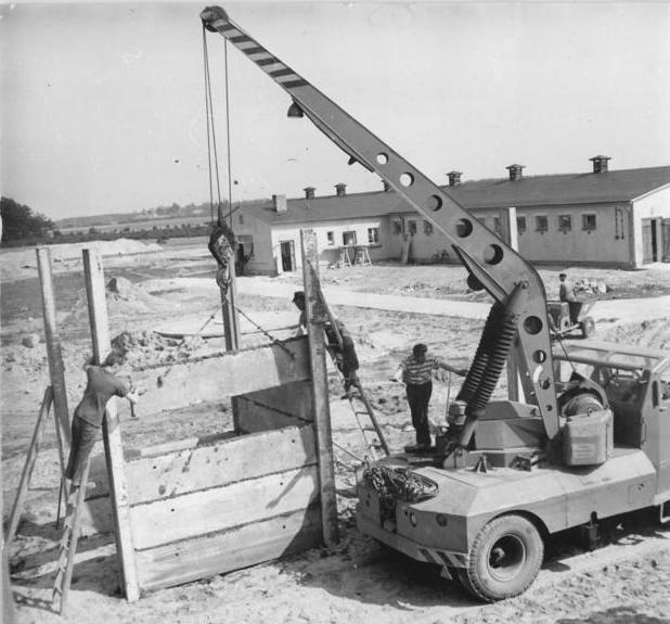 Röddelin, LPG, Bau eines Futterhauses Zentralbild Weigelt 30.5.1962 Kastenbauweise schnell und billig Große Erfahreungen besitzt der VEG (B) Mastenbau Neubrandenburg im schnellen Banau . Durch die Blockbauweise und den Einsatz eies Autokranes weden innerhalb weniger Tage Ställe und Gutterhäuser für Rider - und Schweinekombinate fertiggestellt. UBz: Großplatten werden zu einem Futterhaus für das Rinderkombinat der LPG " Freidenswacht" im Röddelin Kreis Templin, zusammengesetzt.